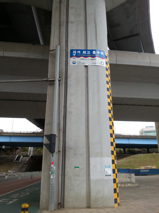 과거 최고 홍수위 안내판 (한강 잠수교 북단 , 반포대교 아래)